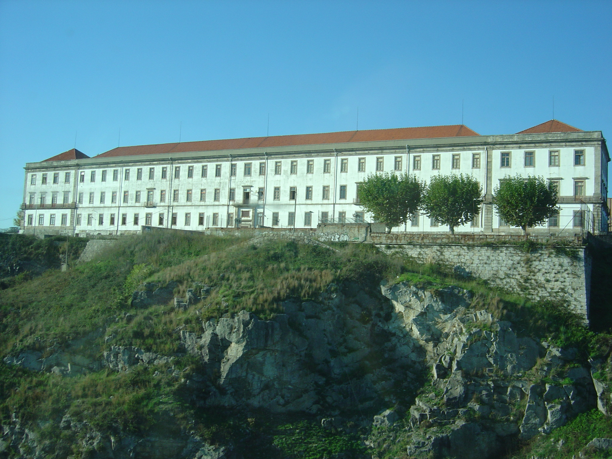 Real Colégio dos Meninos Órfãos do Porto / Real Colégio de Nossa Senhora da Graça dos Meninos Órfãos / Igreja e Colégio dos Órfãos / Antigo Seminário Episcopal do Porto. Freguesia do Bonfim, Porto.